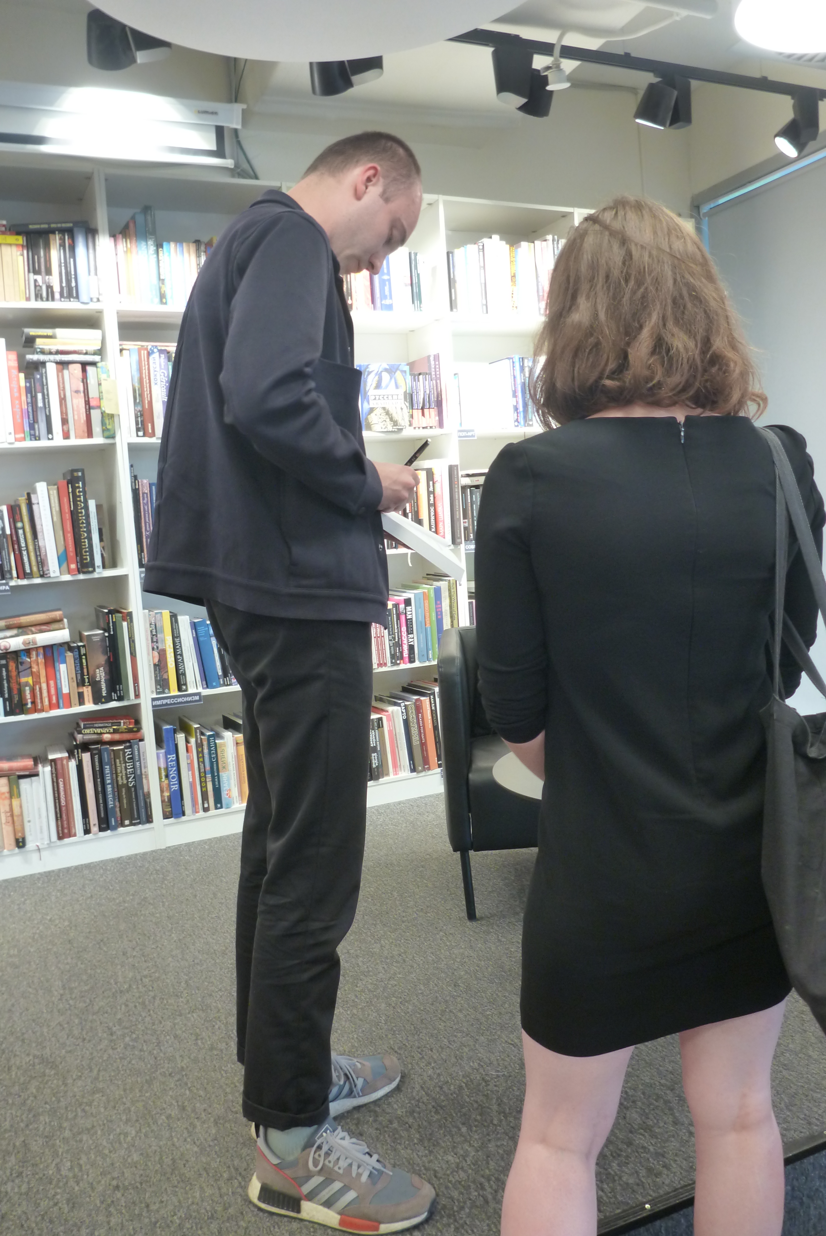 Даниил Иванович Туровский в книжном магазине "Пиотровский" в Ельцин-центре, 13 июля 2019 года